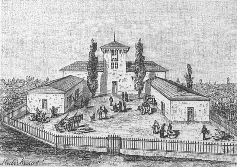 Illustration du Clos Haut Peyraguey dans l'ouvrage Bordeaux et ses vins (6ème édition) de Charles Cocks et Edouard Féret publié en 1893